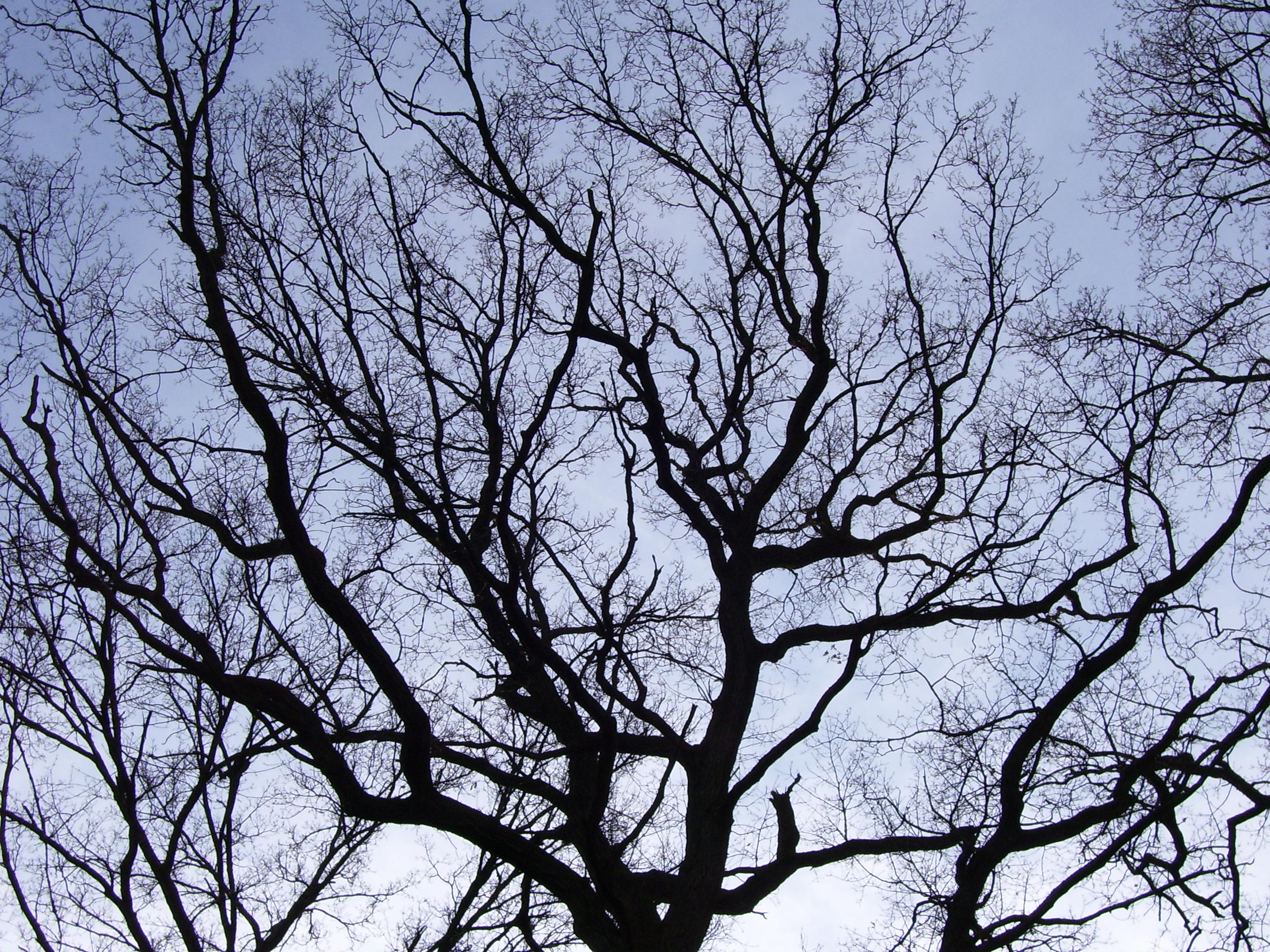 Geäst eine Laubbaumes